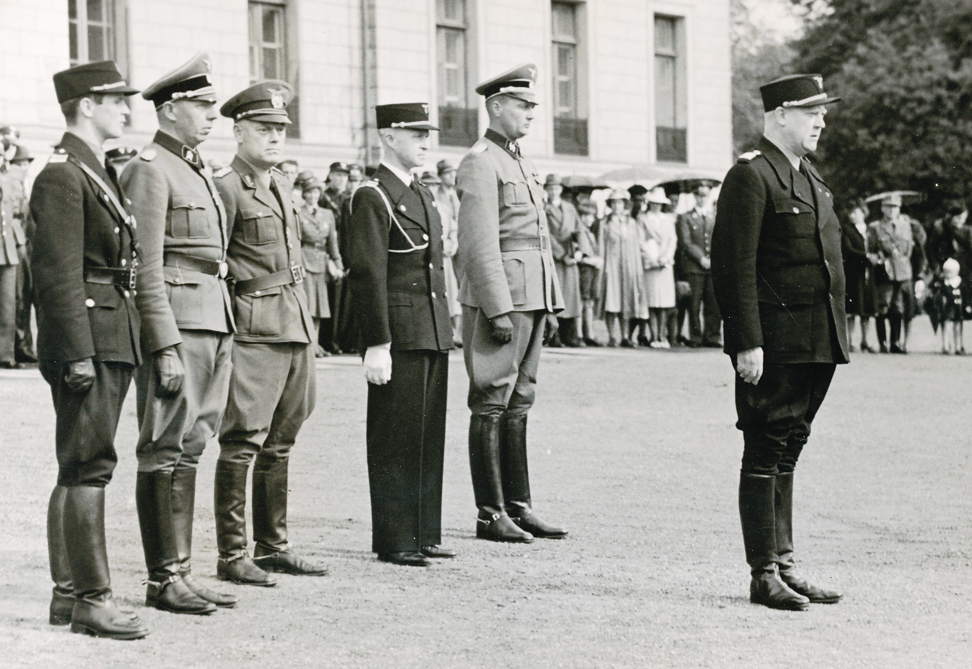 Fra venstre: Thorvald Thronsen (stabssjef, Rikshirden), Arthur Quist (øverste sjef for Den Norske Legion), Jonas Lie (politiminister)), Carl Haakon Langlie (Quislings adjutant), Karl Leib (leder for Germanische Leitstelle) med Vidkun Quisling foran, ukjent datering, fotograf: Max Ehlert Dato: søndag 14. juni 1942. RA/PA-1614/U/0002/0001/0006 1220